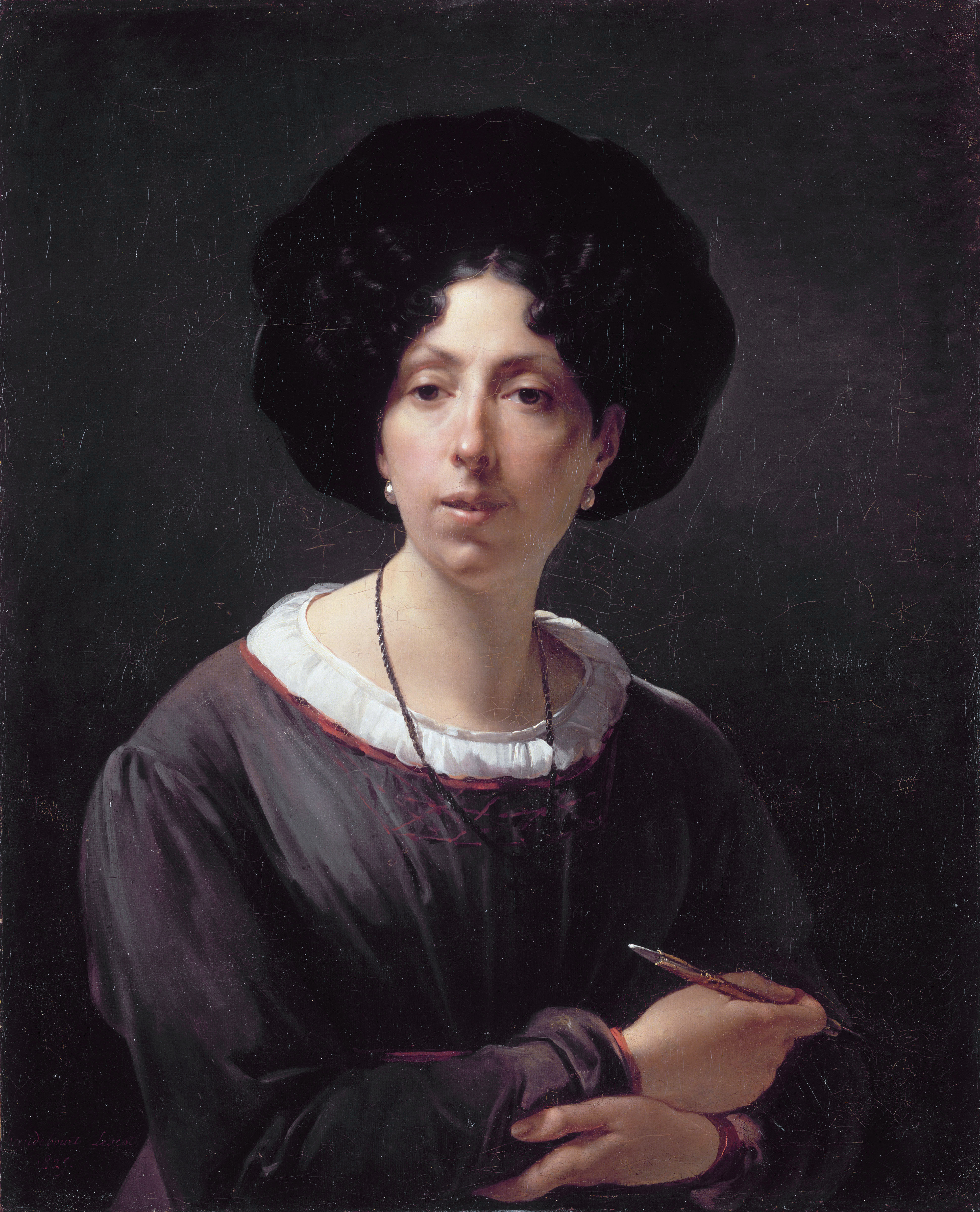 Self-portrait